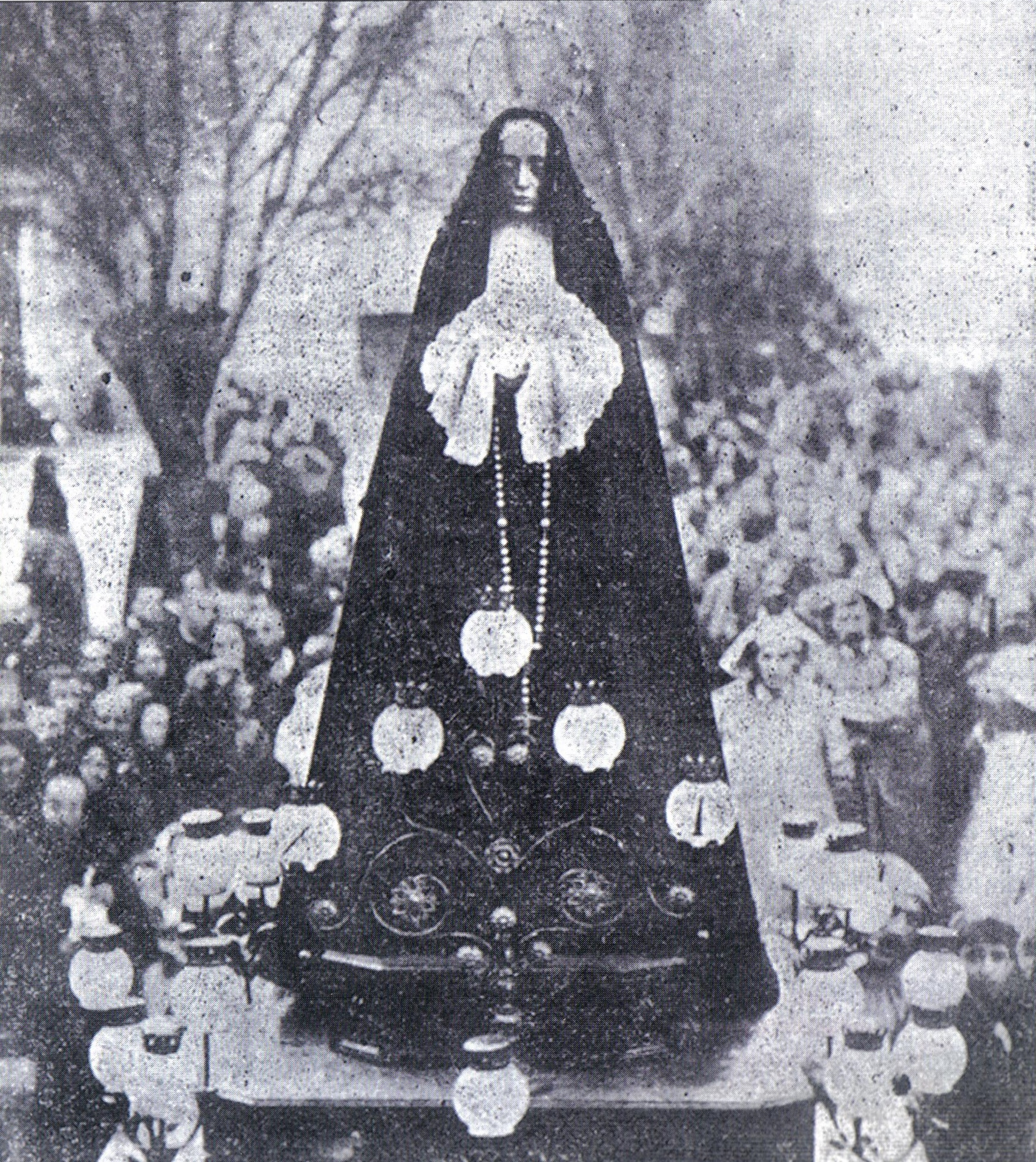 Paso de la Virgen de la Soledad de Salamanca, en la procesión del Santo Entierro celebrada el Viernes Santo 8 de abril de 1898 a su paso por la plaza de las Agustinas.